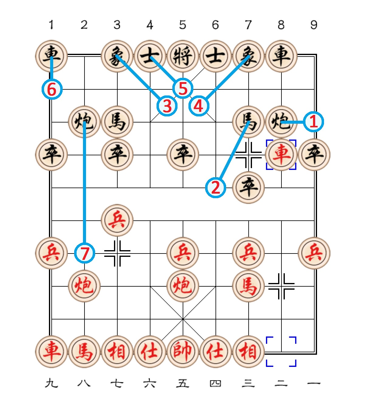 Tổng quan bình phong mã hiện đại